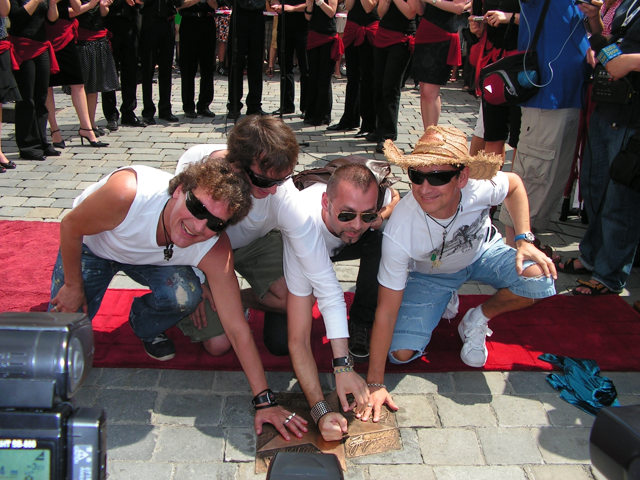 Lady Pank otrzymuje swoją gwiazdę w Opolu 2007. Autor Bartek Banachowski. Fotka udostępniona za wiedzą i zgodą autora.